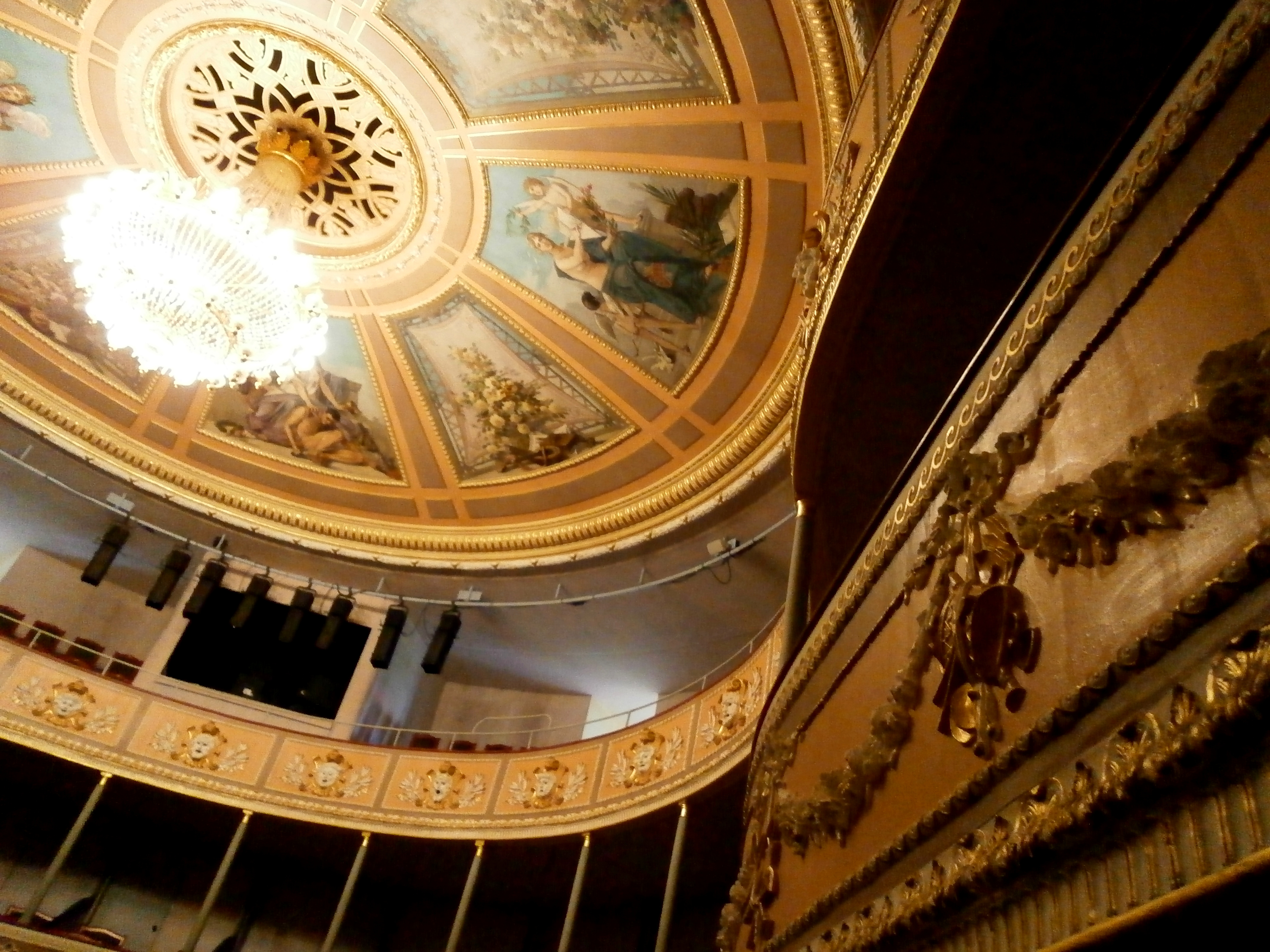 La Roche-sur-Yon, Théâtre municipal à l'italienne. Intérieur. Plafond peint par Georges Levreau (1986) et lustre.